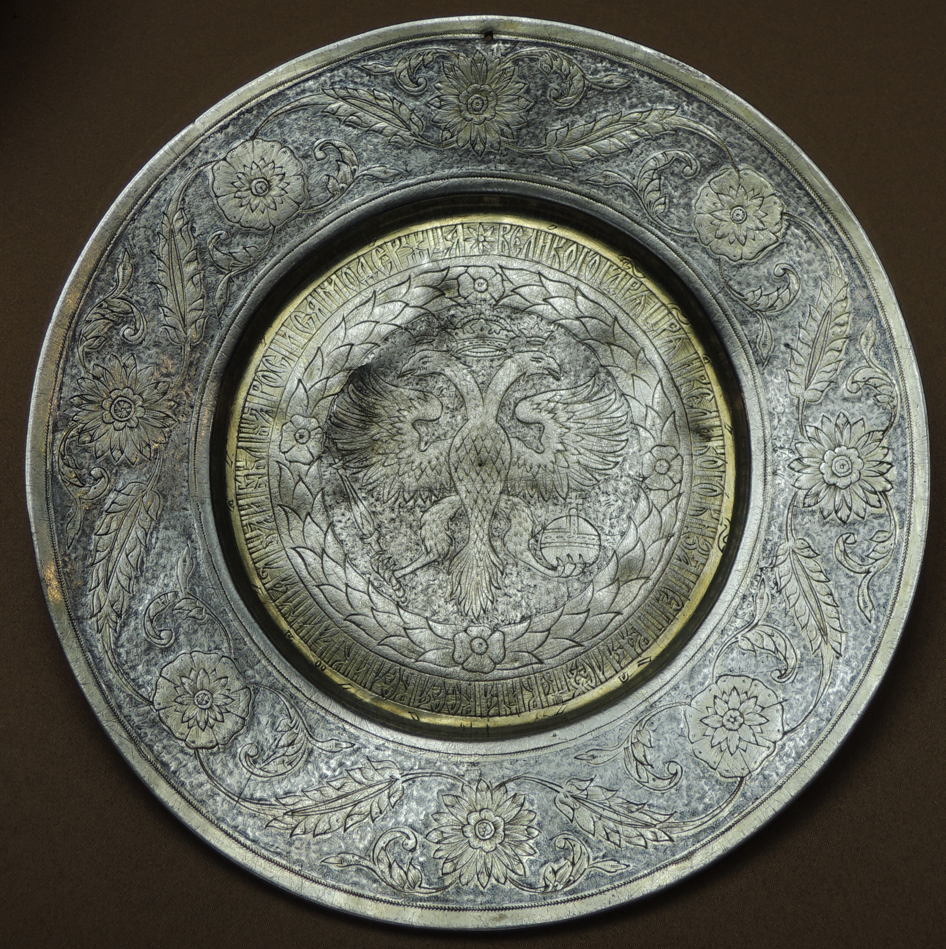 Тарель царя Петра I. 17 век. ГИМ